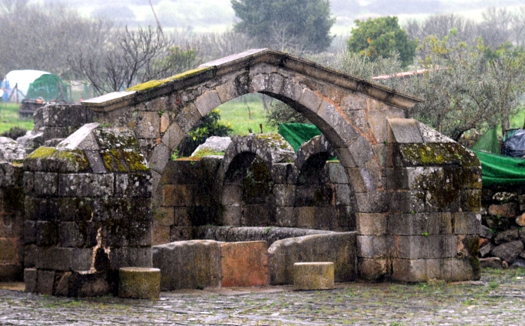 Fuente Conceja, Zarza la Mayor (Cáceres)